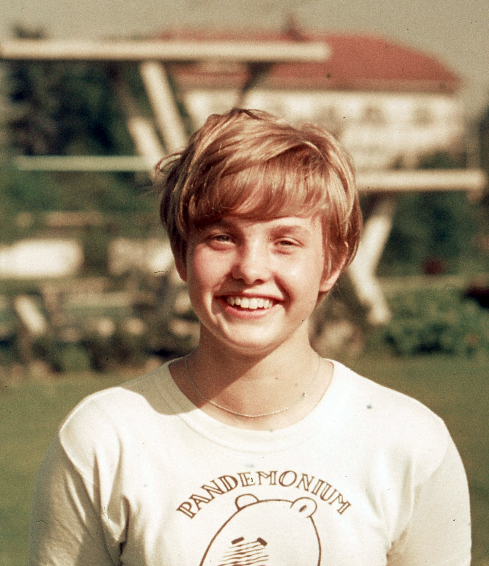 Milena Duchková, Olympiasiegerin im Turmspringen 1968 und 1972, 1970 in Zürich